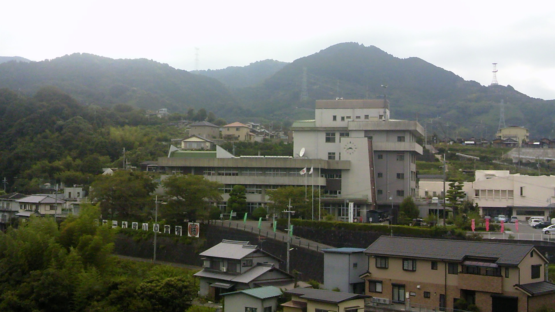 和歌山県九度山町役場